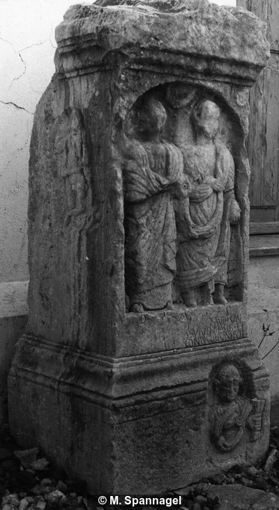 F002802